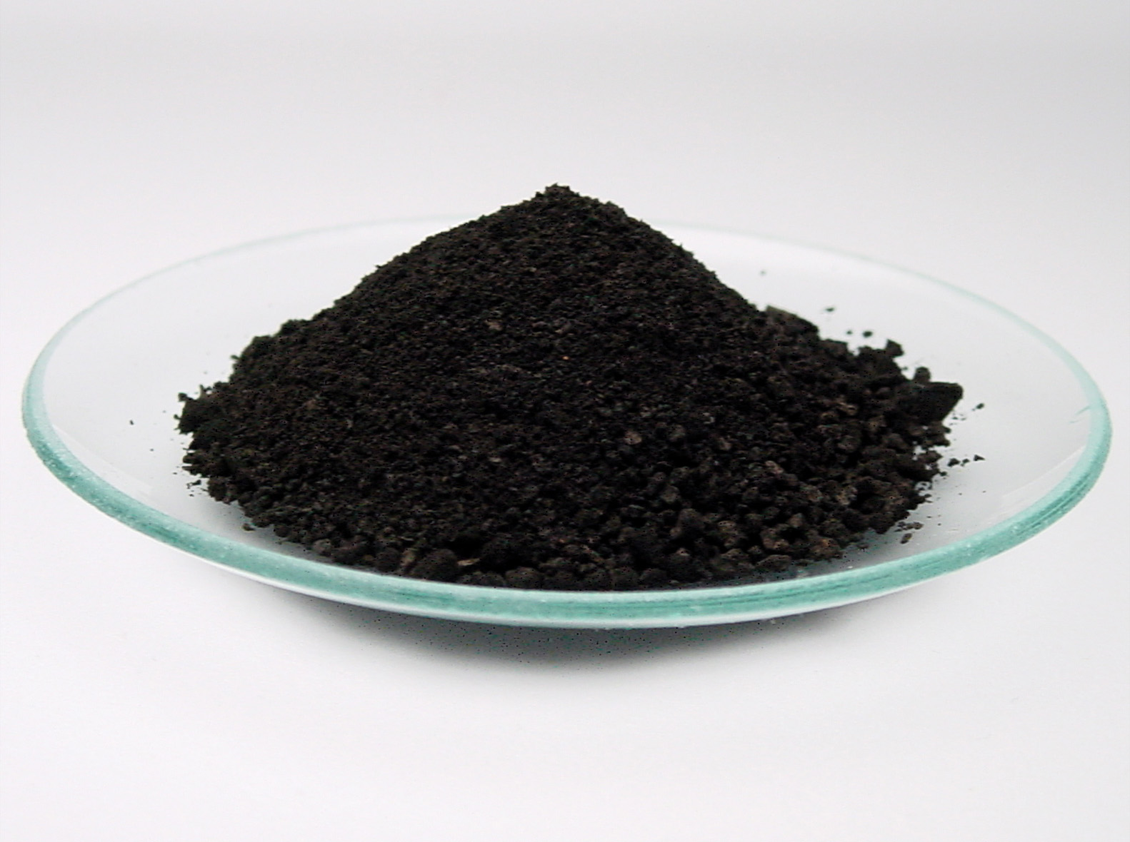 Iron(II) oxide powder